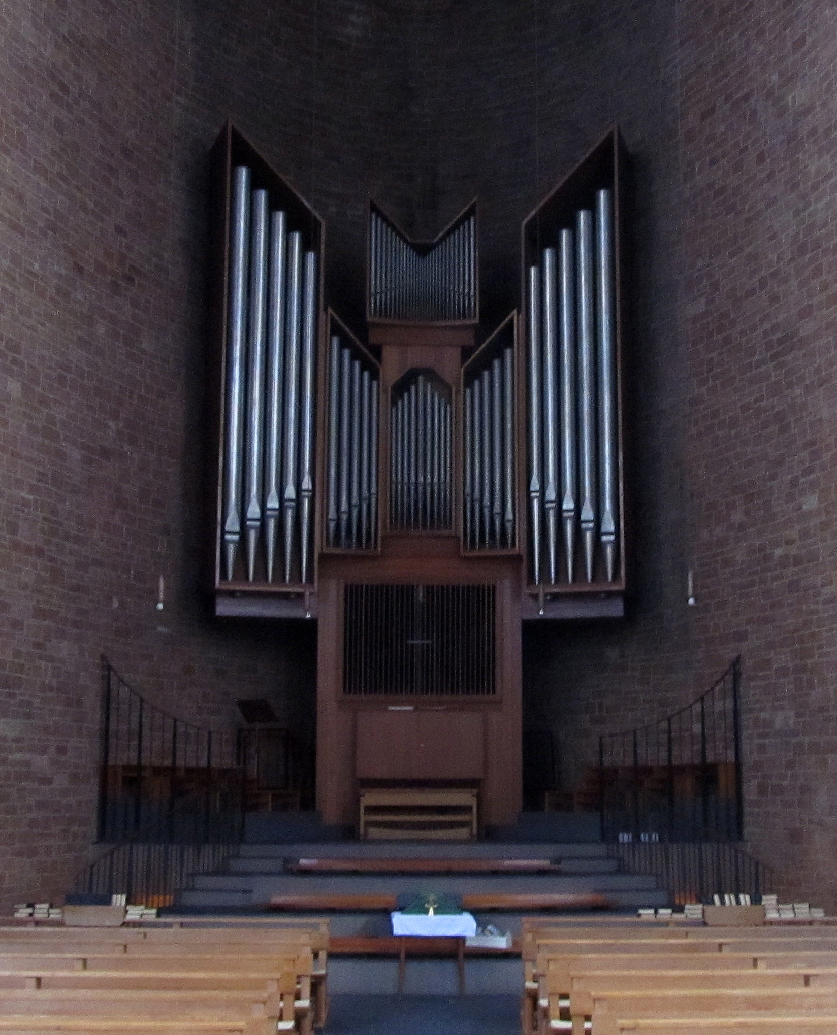 Orgel in der katholischen Pfarrkirche Maria Königin in Saarbrücken, Saarland